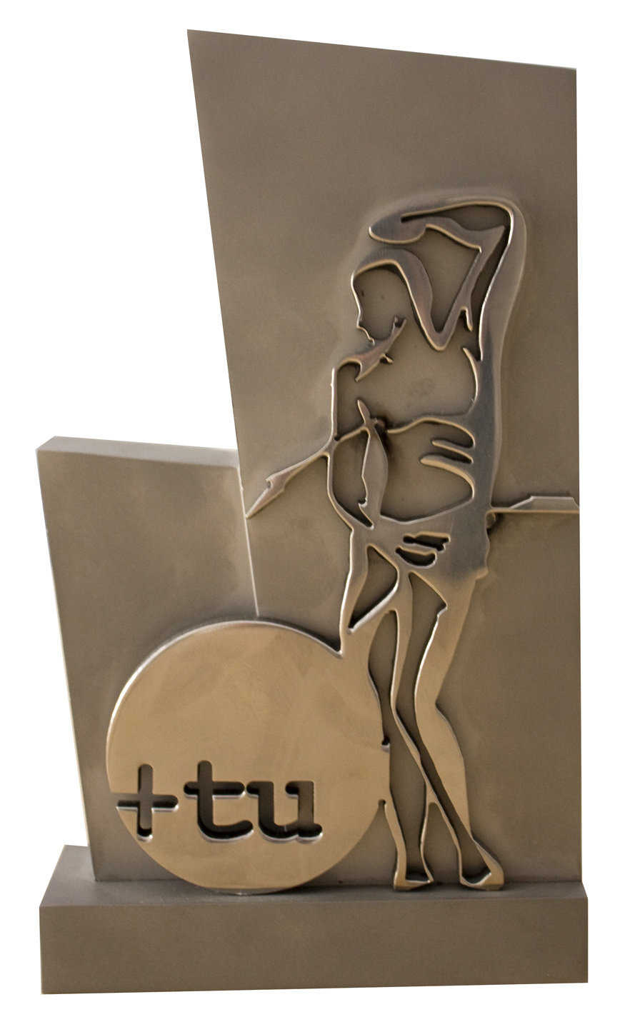 Estatua premio